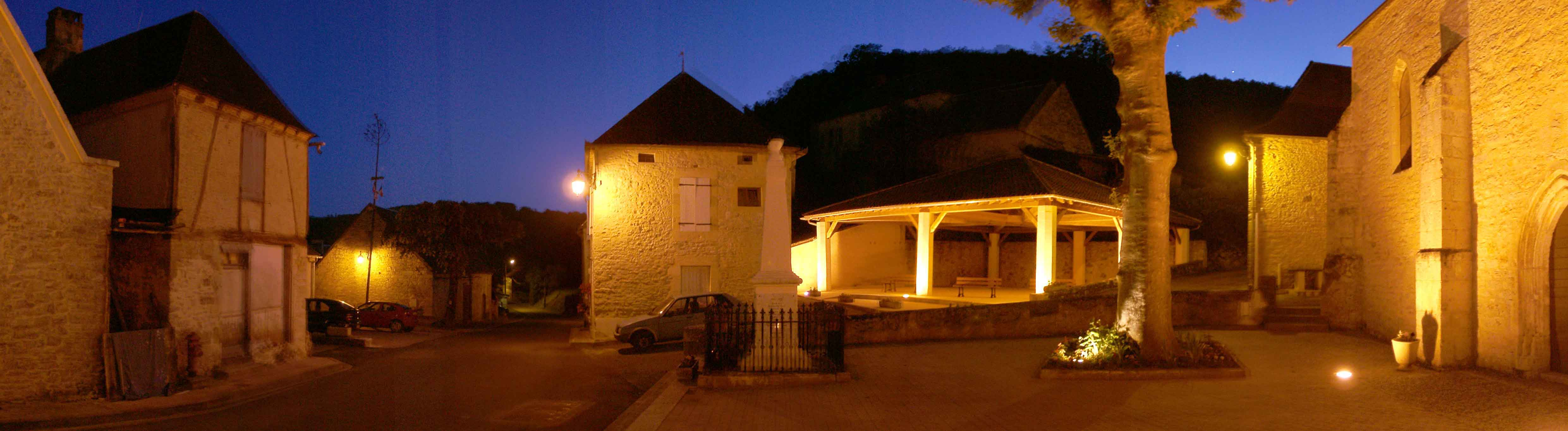 SAINTCLAIRPLACE